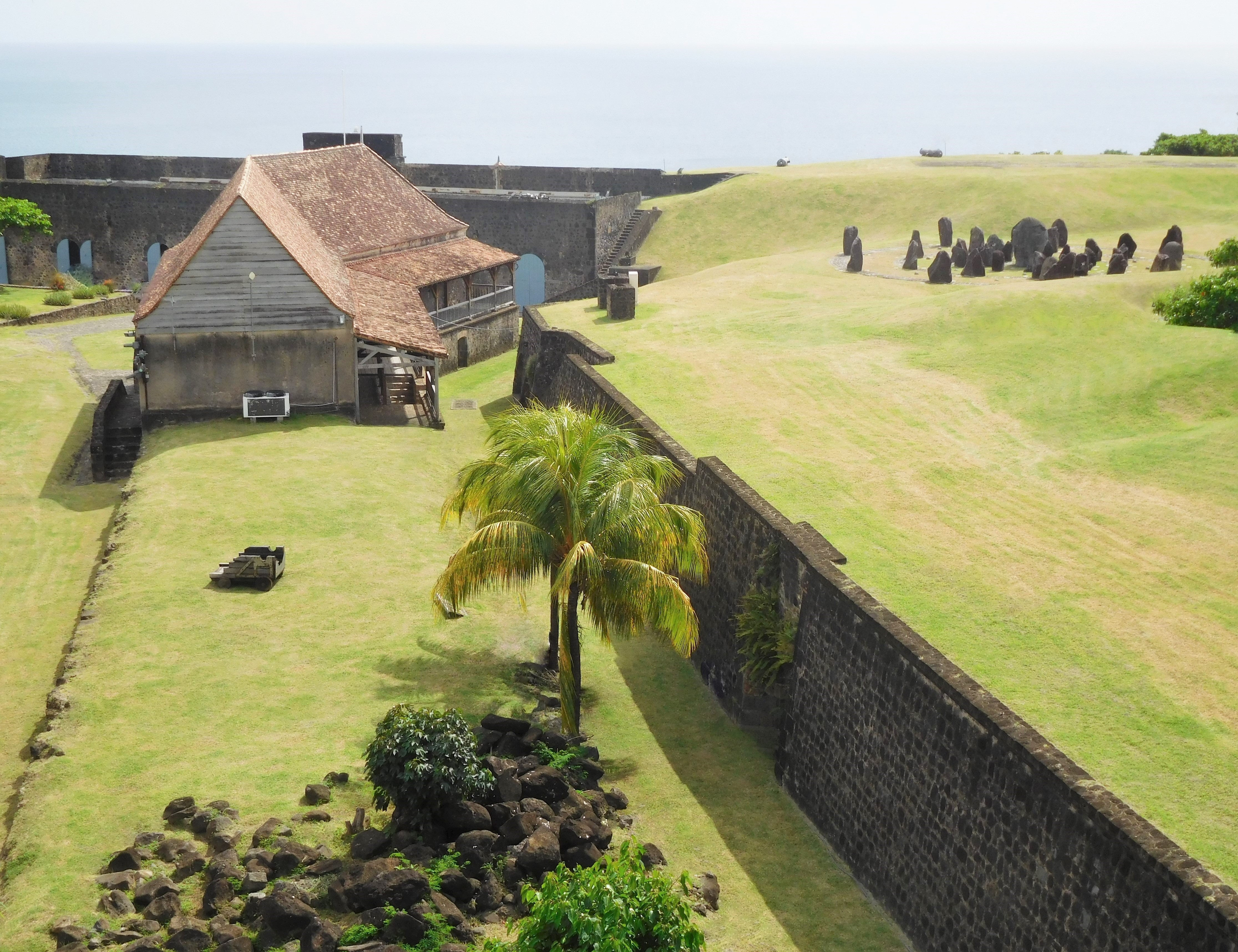 Le Fort Louis Delgrès (vue sur grande caserne, mémorial Delgrès et de la rade). .